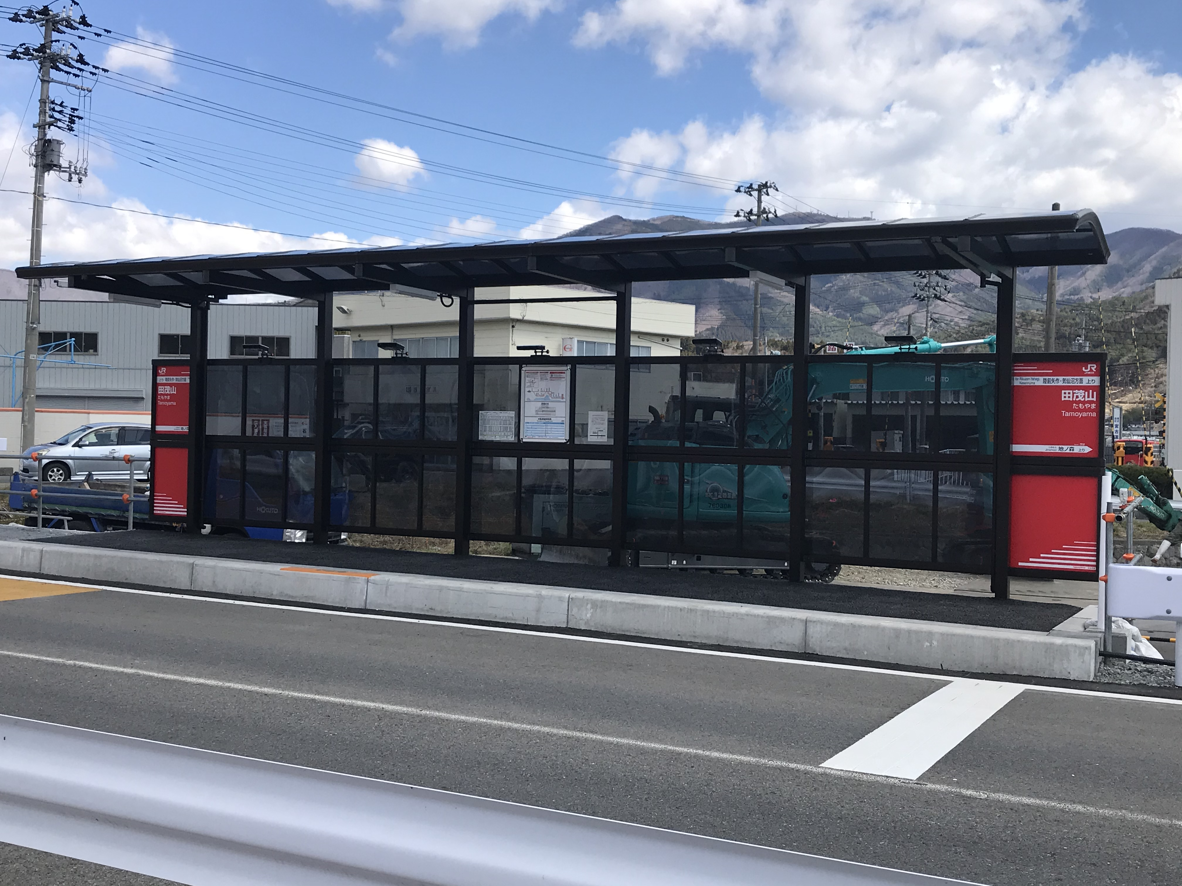 JR東日本BRT大船渡線の田茂山駅